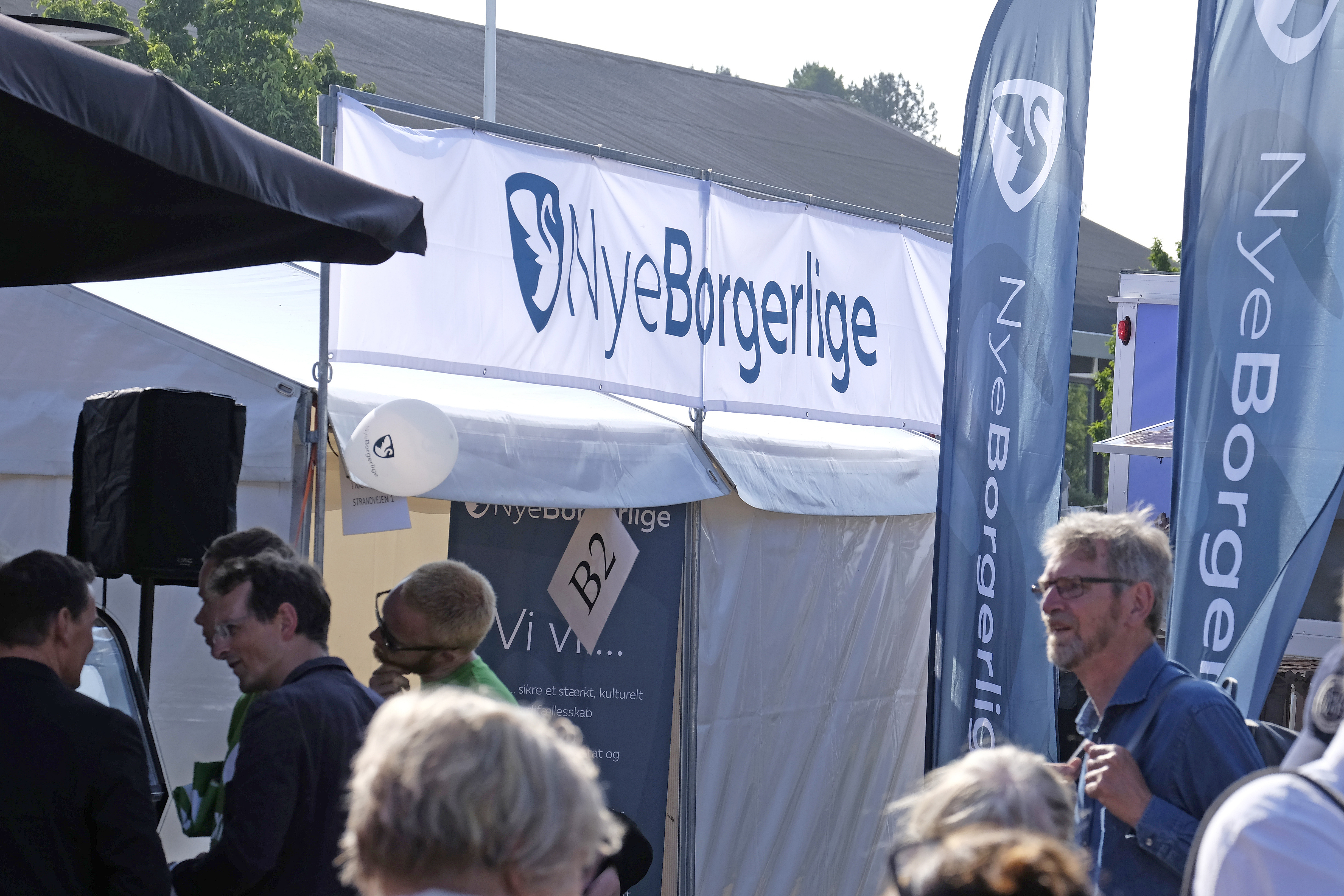 Det nya danska partiet Nye Borgerlige ved Folkemødet i Allinge, Bornholm 20160616 Photo: News Øresund - Thea Wiborg. © News Øresund - Thea Wiborg (CC BY 3.0). Detta verk av News Øresund är licensierat under en Creative Commons Erkännande 3.0 Unported-licens (CC BY 3.0). Bilden får fritt publiceras under förutsättning att källa anges. .The picture can be used freely under the prerequisite that the source is given. News Øresund, Malmö, Sweden... .News Øresund är en oberoende regional nyhetsbyrå som är en del av det oberoende dansk-svenska kunskapscentrat Øresundsinstituttet.. .